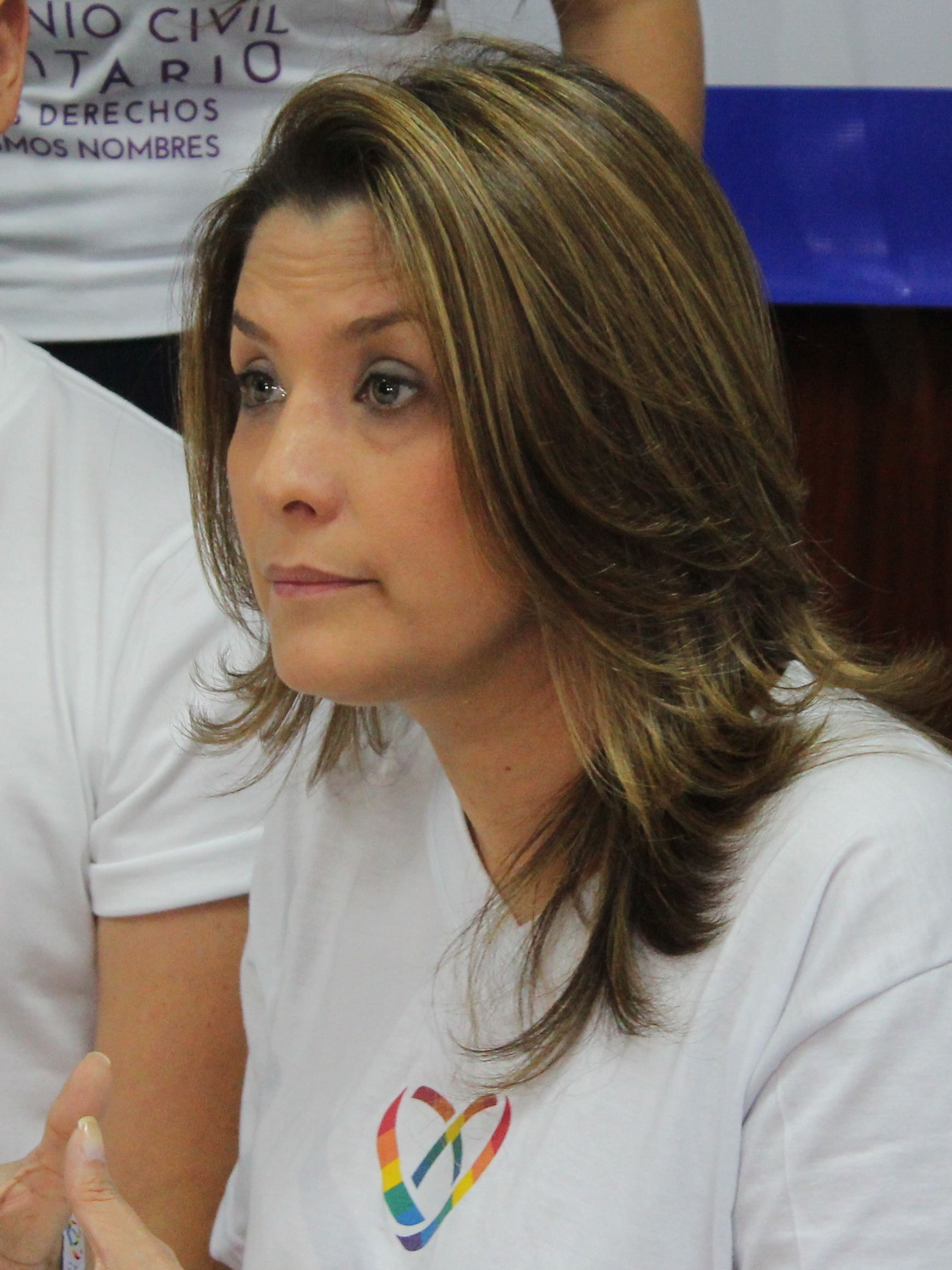 Rueda de prensa para anunciar boda de Santiago Vinces y Fernando Saltos.